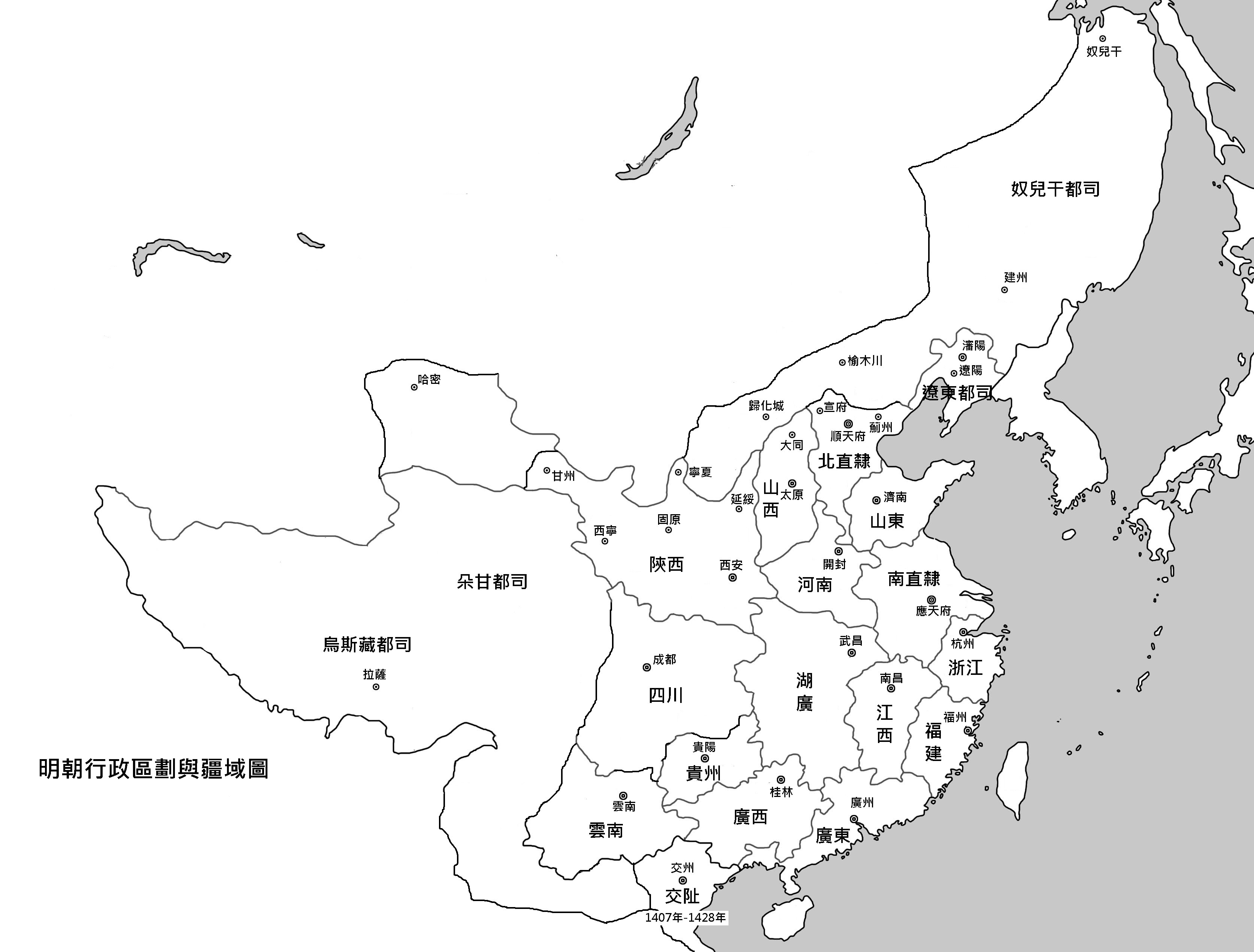 明代疆域圖與行政區劃圖，出自《中國歷史地圖集》。